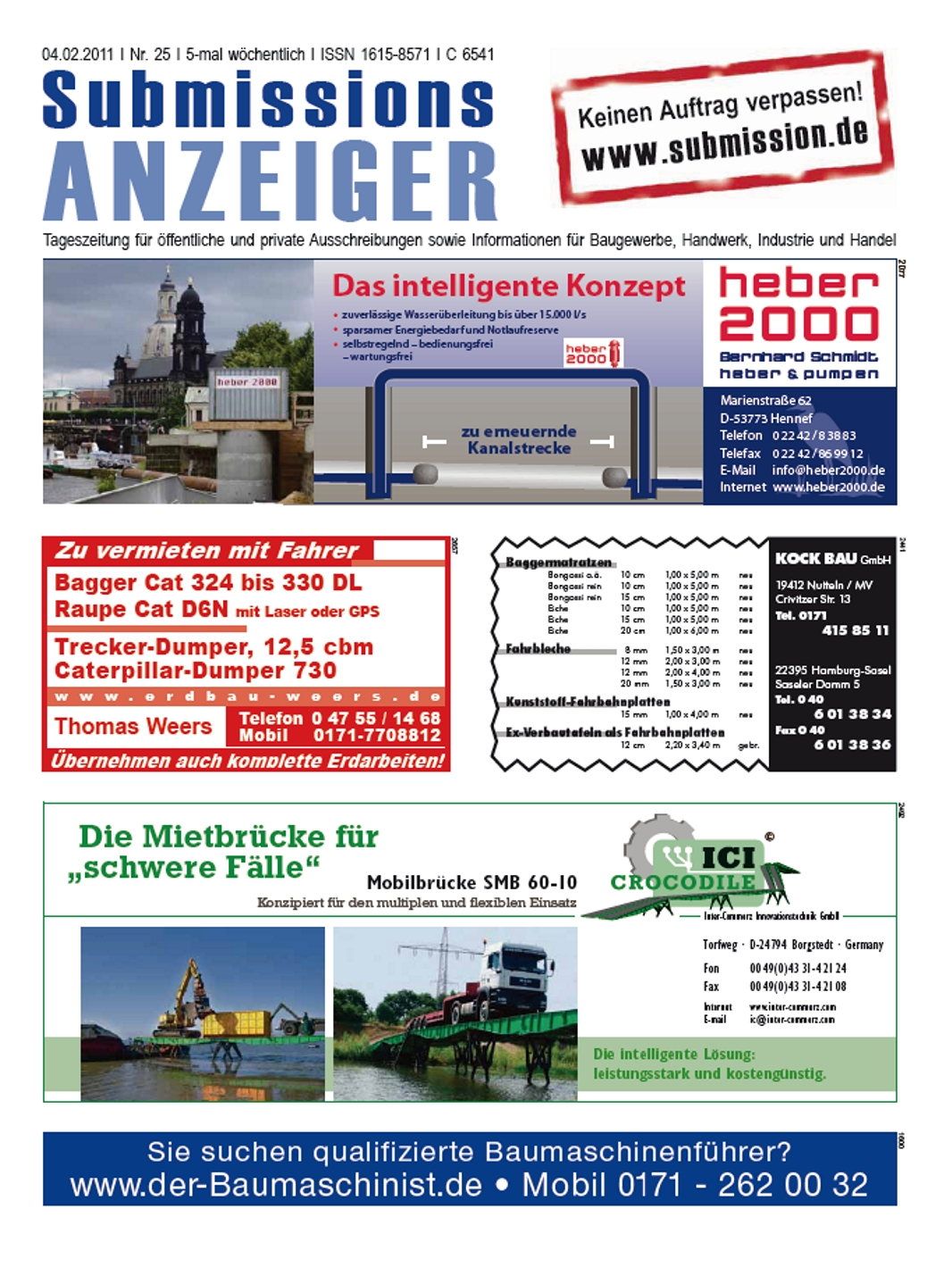 Titel des Submissions-Anzeigers 2011